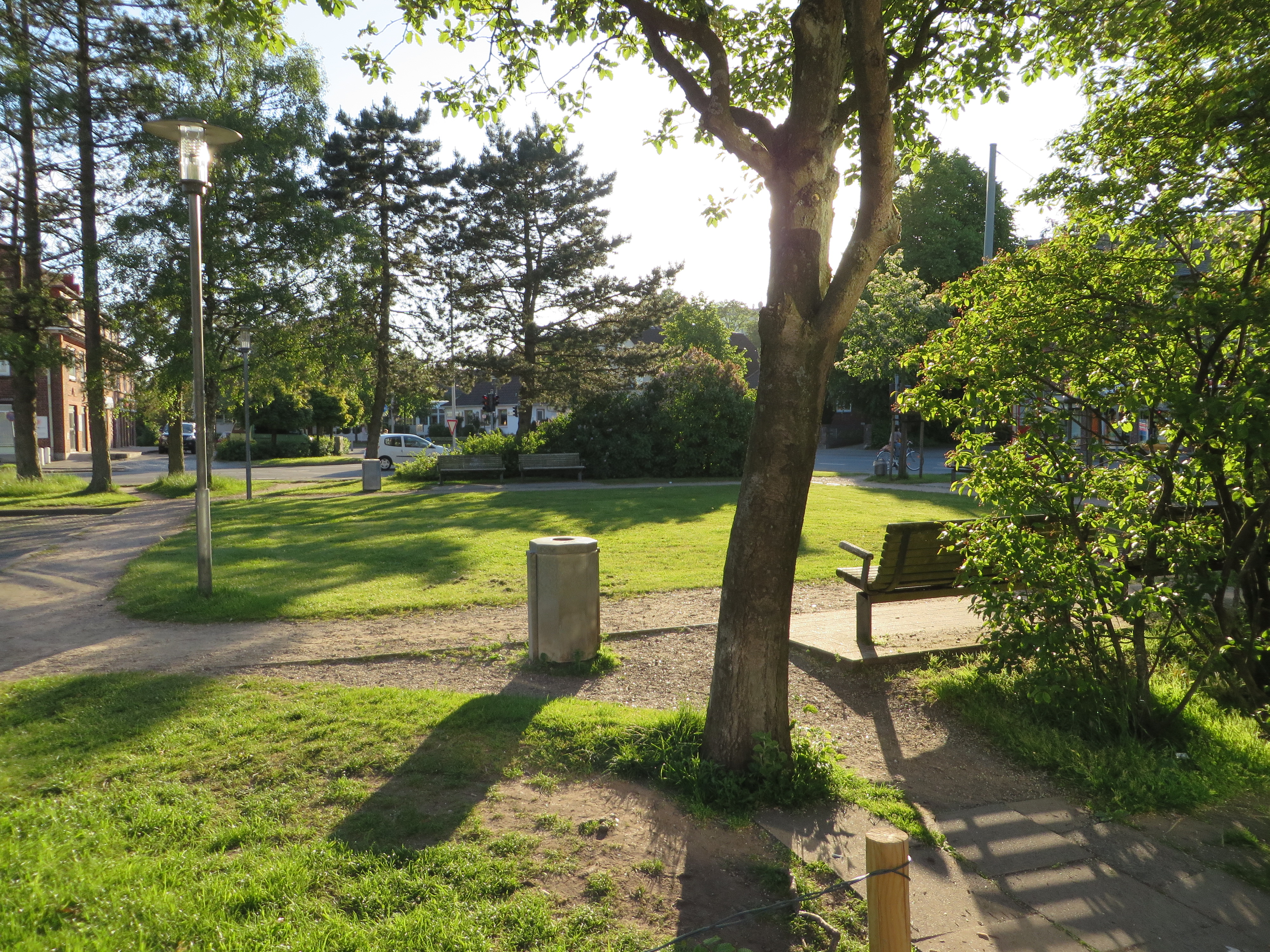 Twedter-Plack-Platz (Flensburg-Mürwik Juni 2015), Bild 02